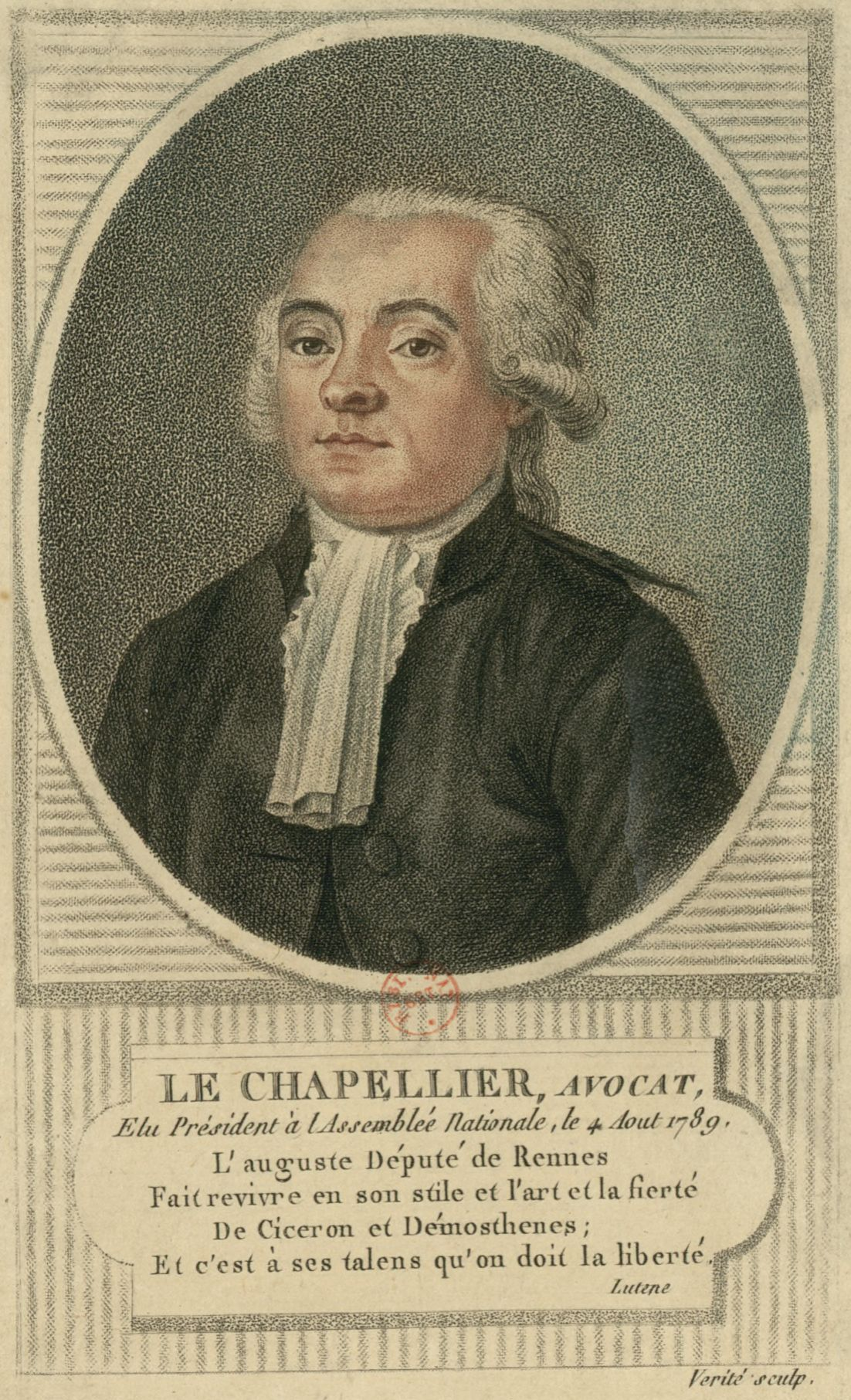 Le Chapellier, avocat, élu président à l'Assemblée nationale, le 4 août 1789 (estampe, pointillé, eau-forte, roulette).